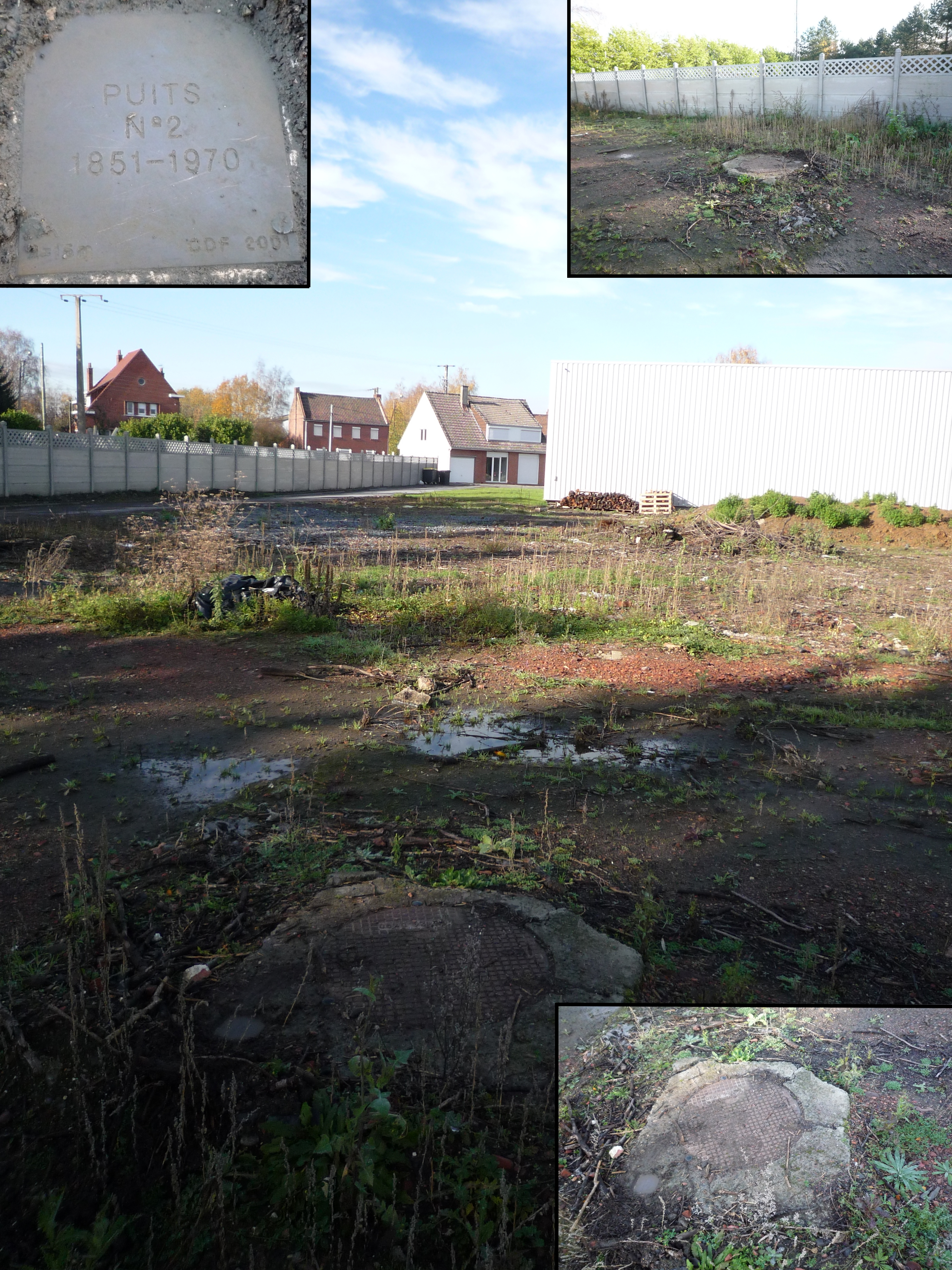 La Fosse n° 2 de la Compagnie des mines de l'Escarpelle était un charbonnage constitué d'un seul puits situé à Leforest, Pas-de-Calais, Nord-Pas-de-Calais, France.